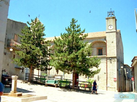 Autore : Deluc.antonio Descrizione : La Chiesa Madre di Sant'Elia a Maschito